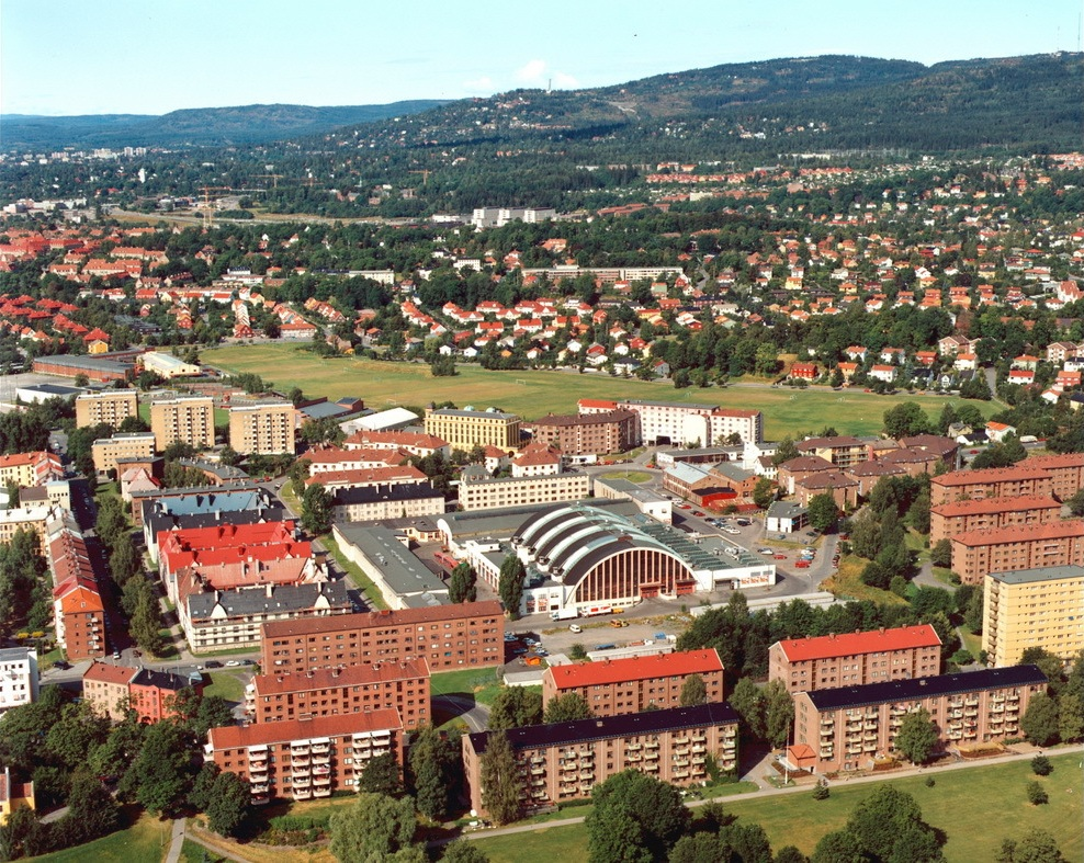 Luftfoto av Bjølsen i 1995. Maridalsveien, Bergensgata, Moldegata, Holmestrandgata, Sarpsborggata, Stavangergata. Lisa Kristoffersens plass. Bussgarasjen på Bjølsen.Voldsløkka og villabebyggelse på Tåsen i bakgrunnen. (Flyfoto) Nederst i venstre hjørne skimtes deler av Heftyeløkken. De to blokkene nærmest kamera/grøntanlegget er Mor Go'hjertas vei nr.23 til venstre og nummer 25-27-29 til høyre.